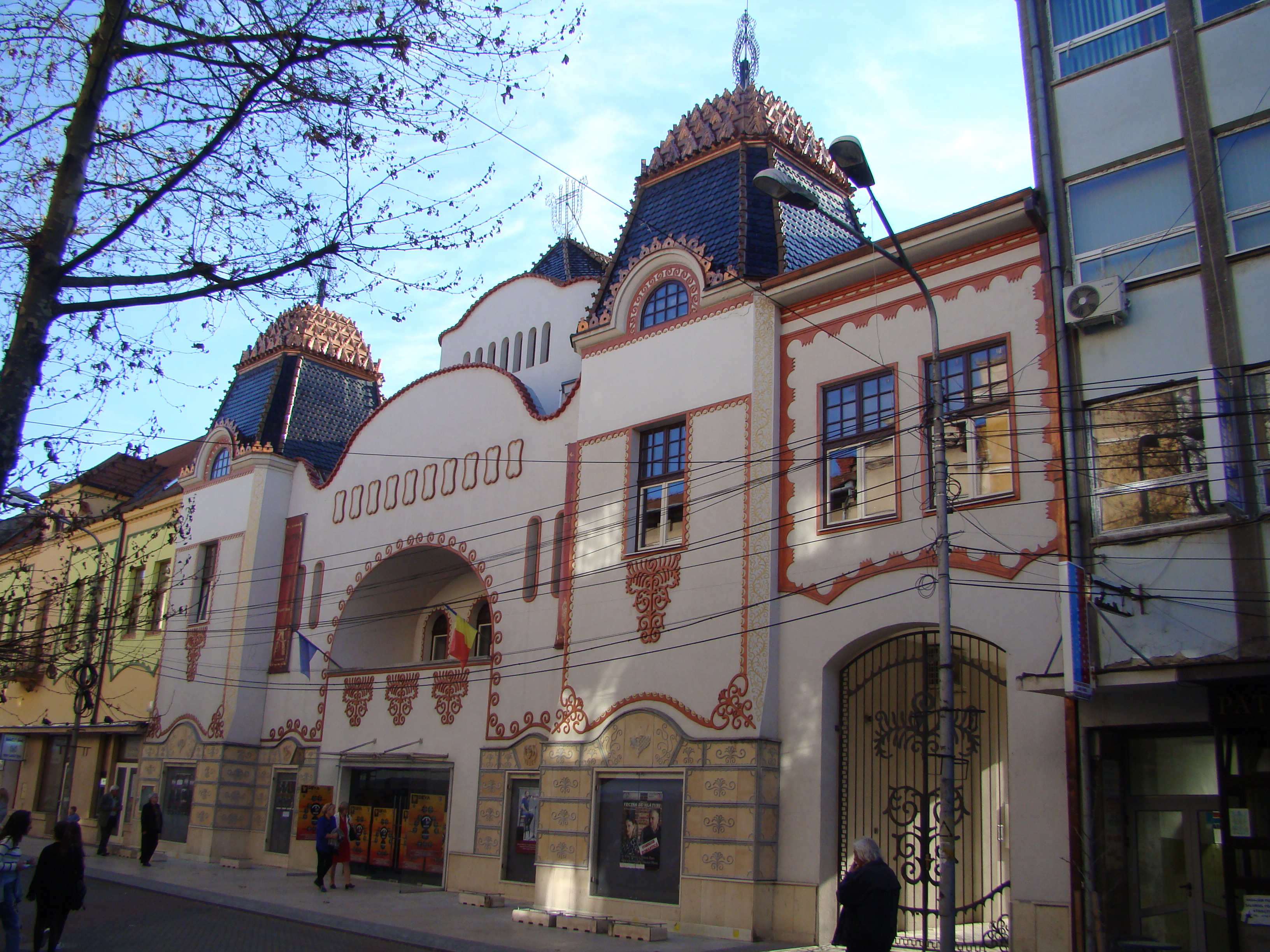 Teatrul Orășenesc, azi Teatrul de Artă Dramatică Deva, municipiul Deva, Bd. 1 Decembrie 1918 15